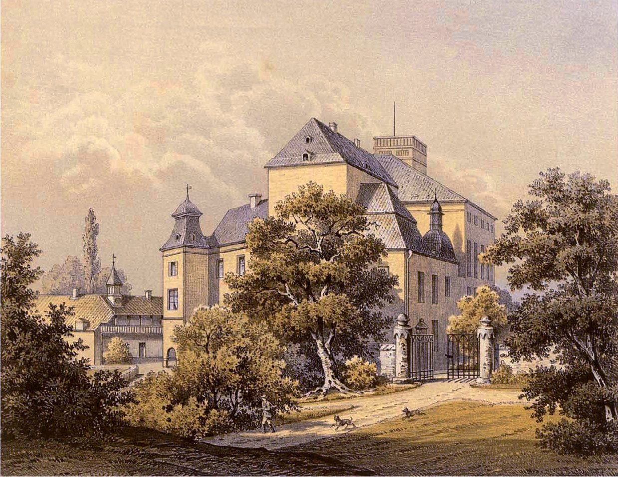 Schloss Schellenberg, Kreis Duisburg